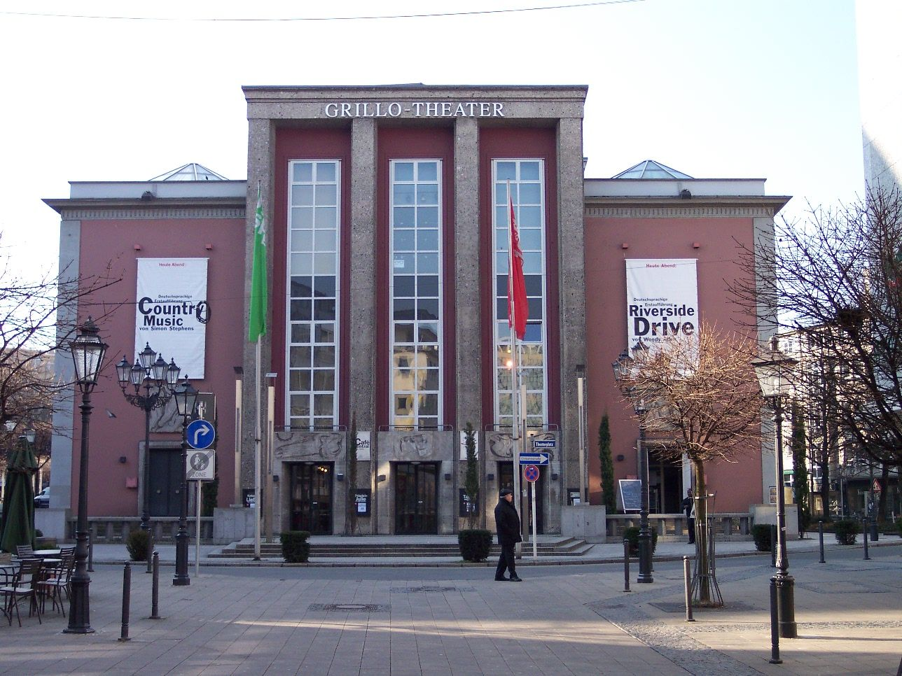 Essen Grillo Theater Front 2005